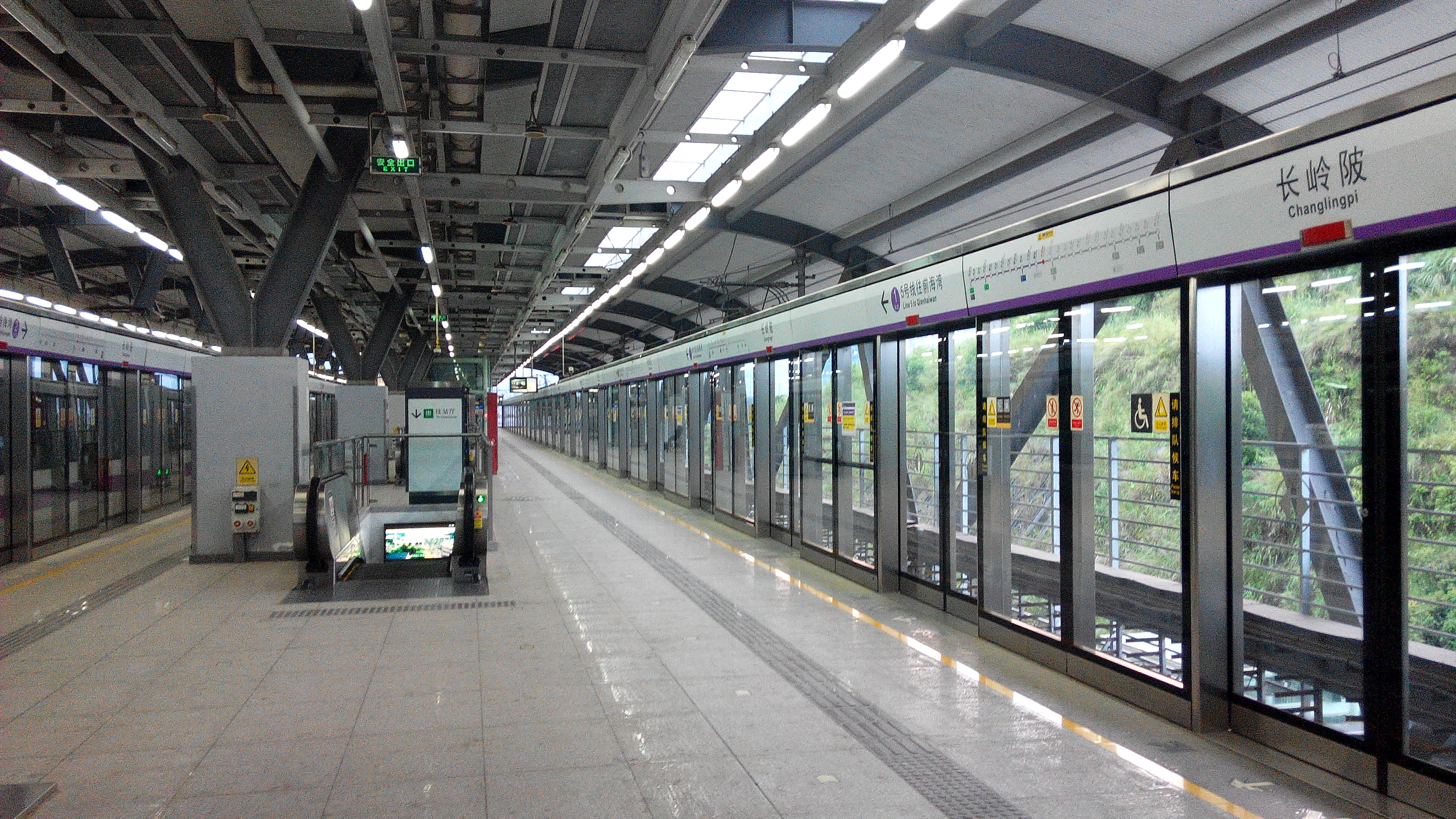 深圳地铁5号线长岭陂站站台